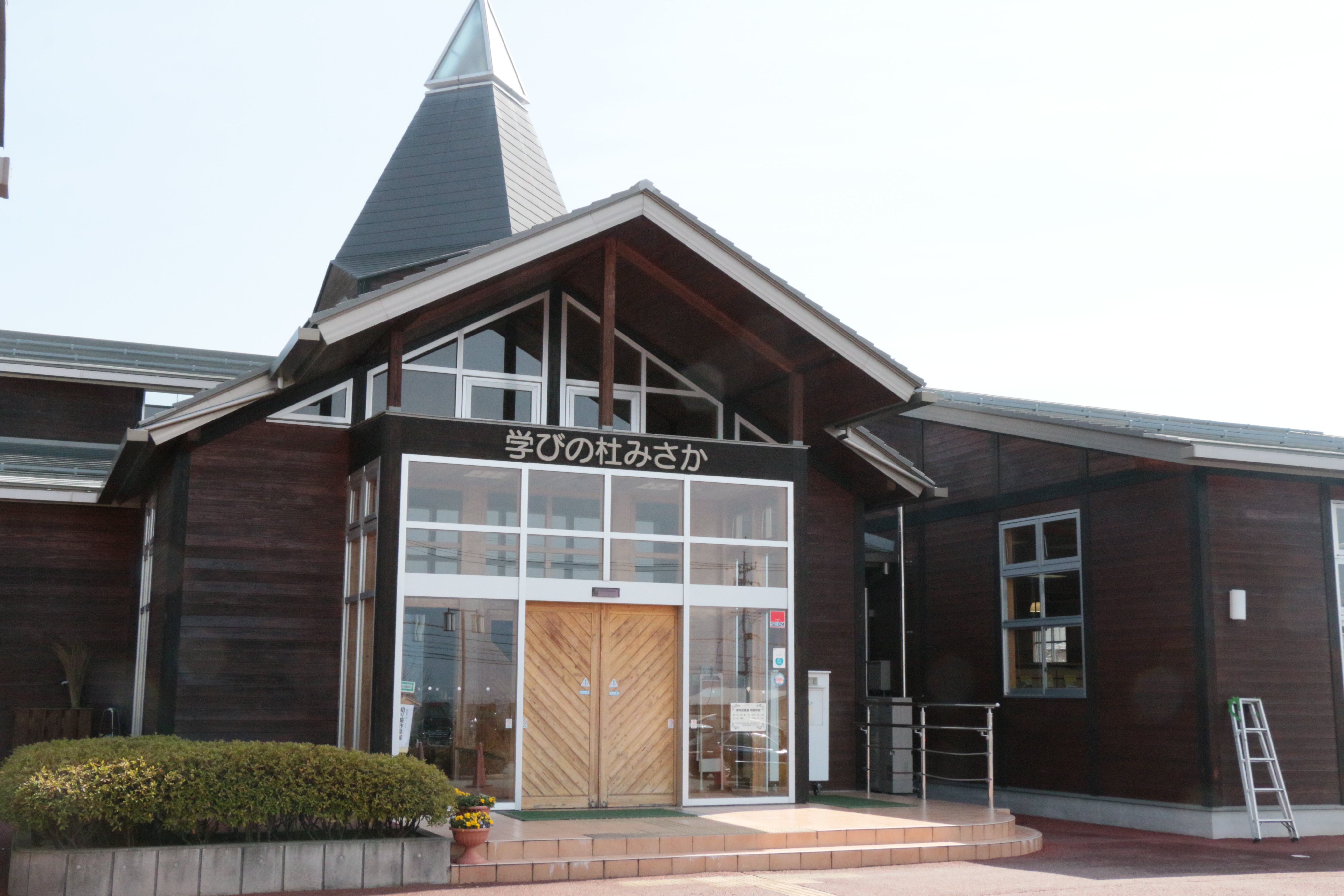 笛吹市御坂図書館